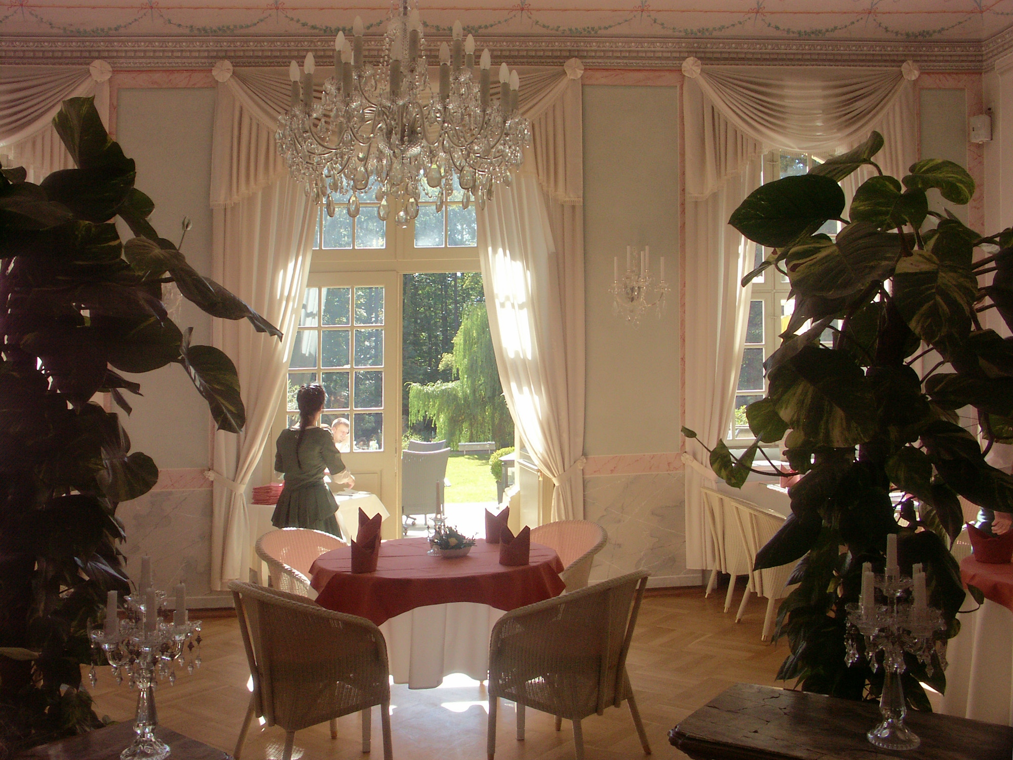 Schloss Rammenau - Restaurant